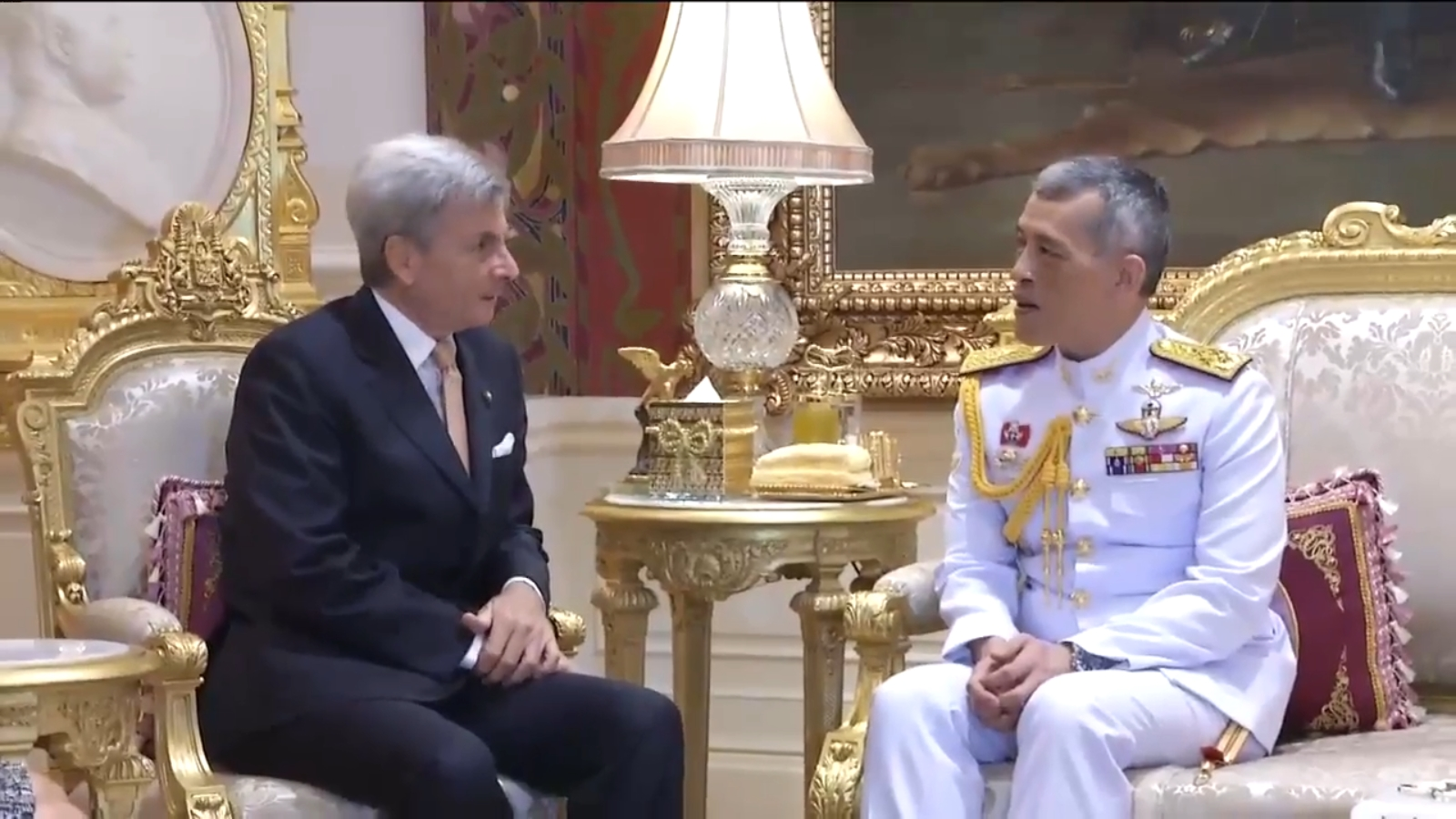 สมเด็จพระเจ้าอยู่หัว พระราชทานพระราชวโรกาสให้คณะบุคคลเฝ้าทูลละอองธุลีพระบาท ณ พระที่นั่งอัมพรสถาน พระราชวังดุสิต